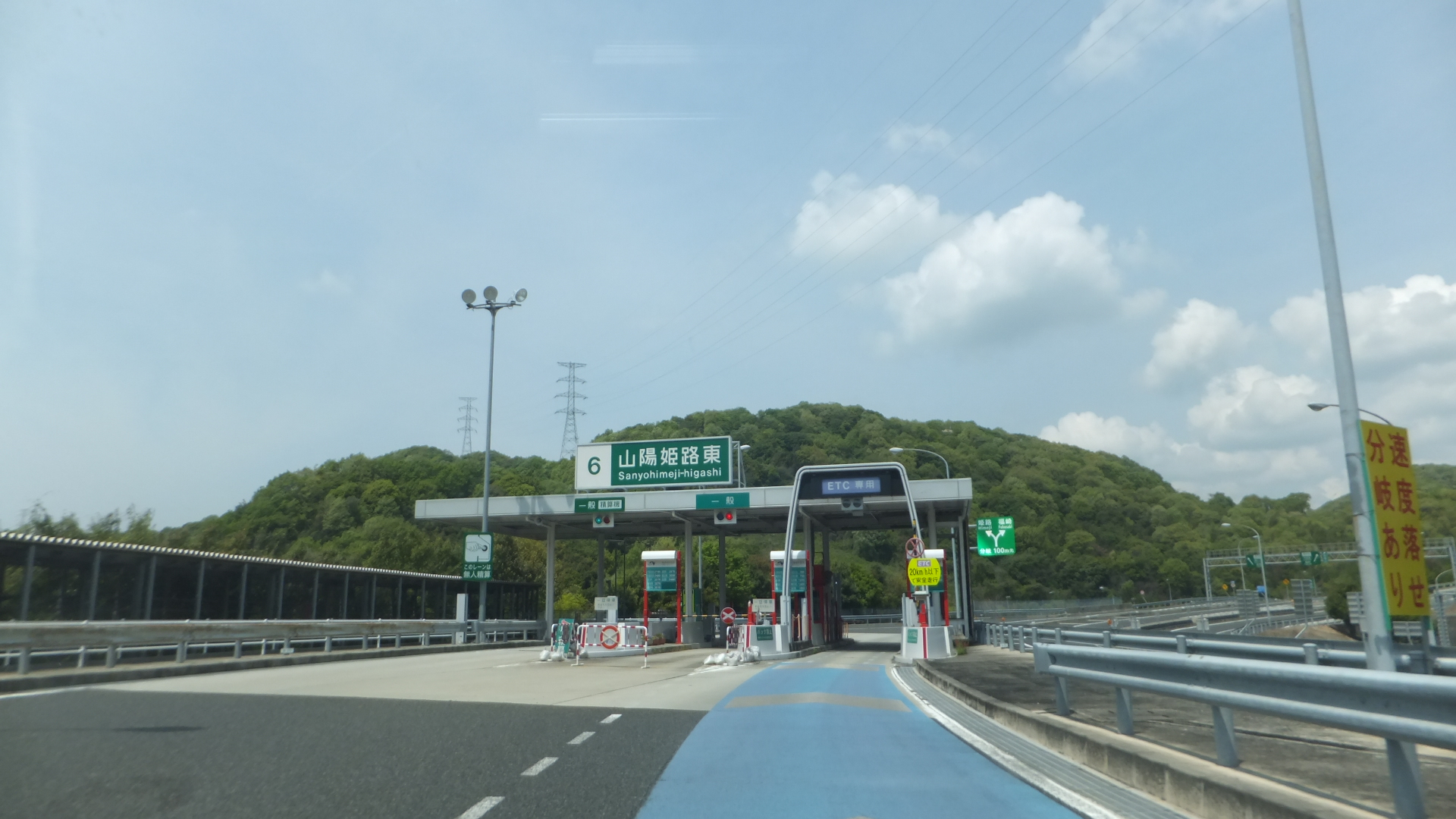 山陽姫路東インターチェンジ